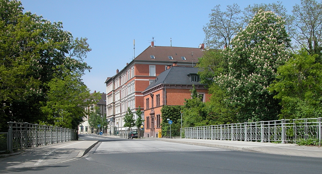 Braunschweig: Hohetorbrücke von Osten gesehen.